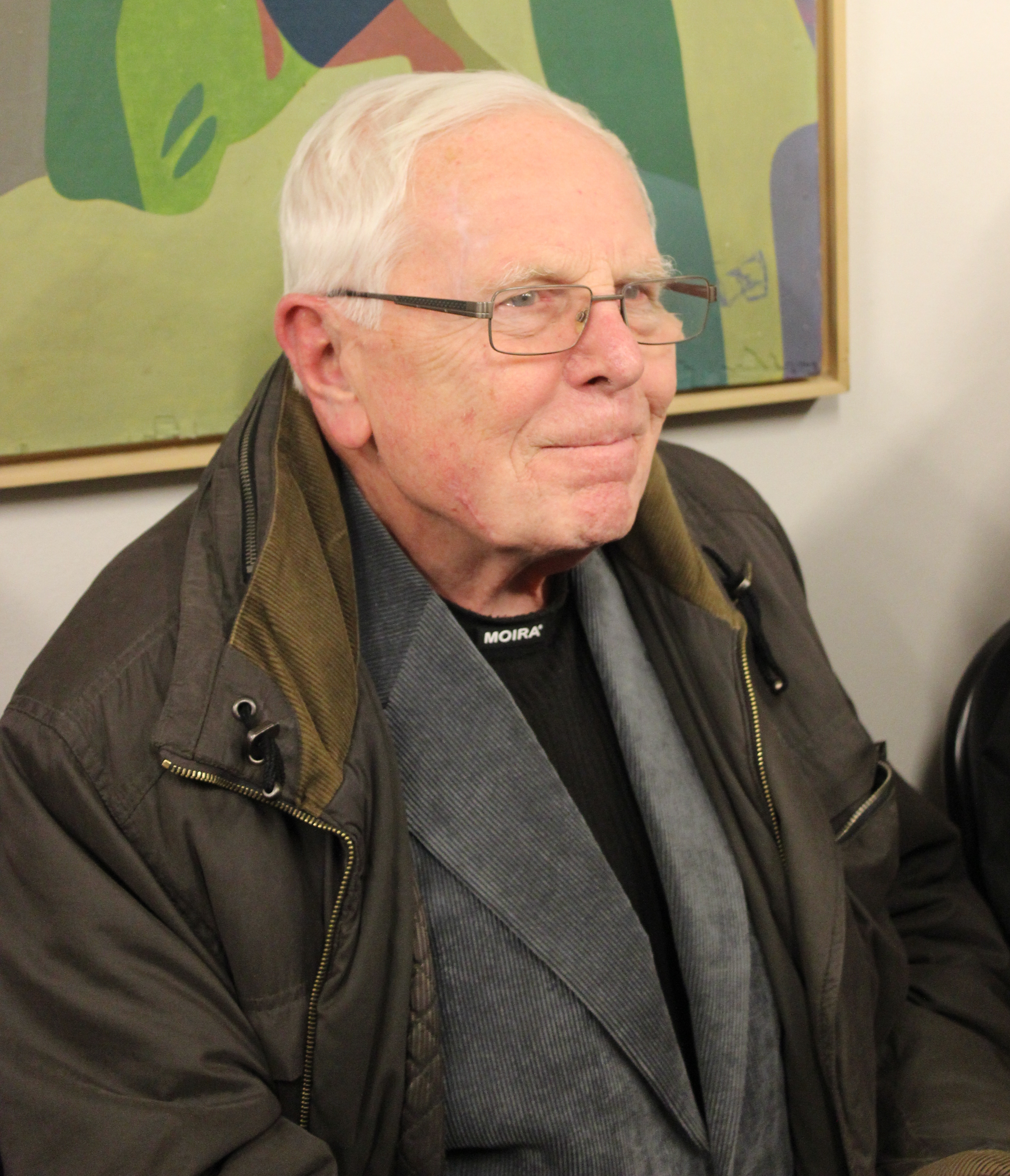 Dalimil Klapka na Maxiautogramiádě konané v pražské galerii Mánesova 54 péčí Vratislava Ebra.